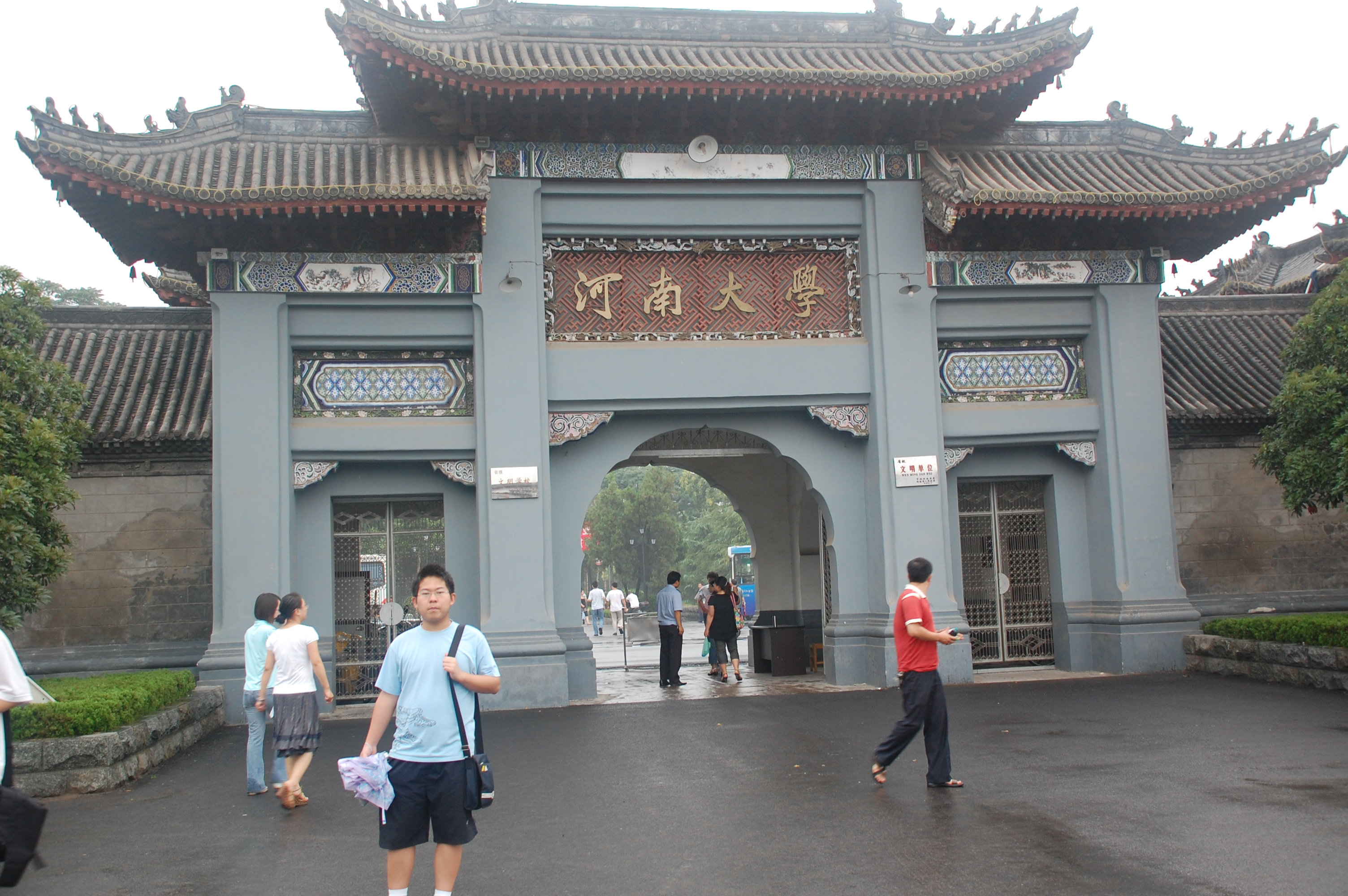 中文（中国大陆）: 河南大学校门